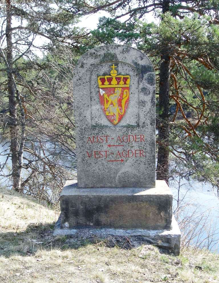 Fylkesgrensen mellom Aust-Agder og Vest-Agder langs riksvei 9